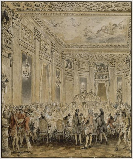 Fête donné à Louveciennes, le 2 septembre 1771